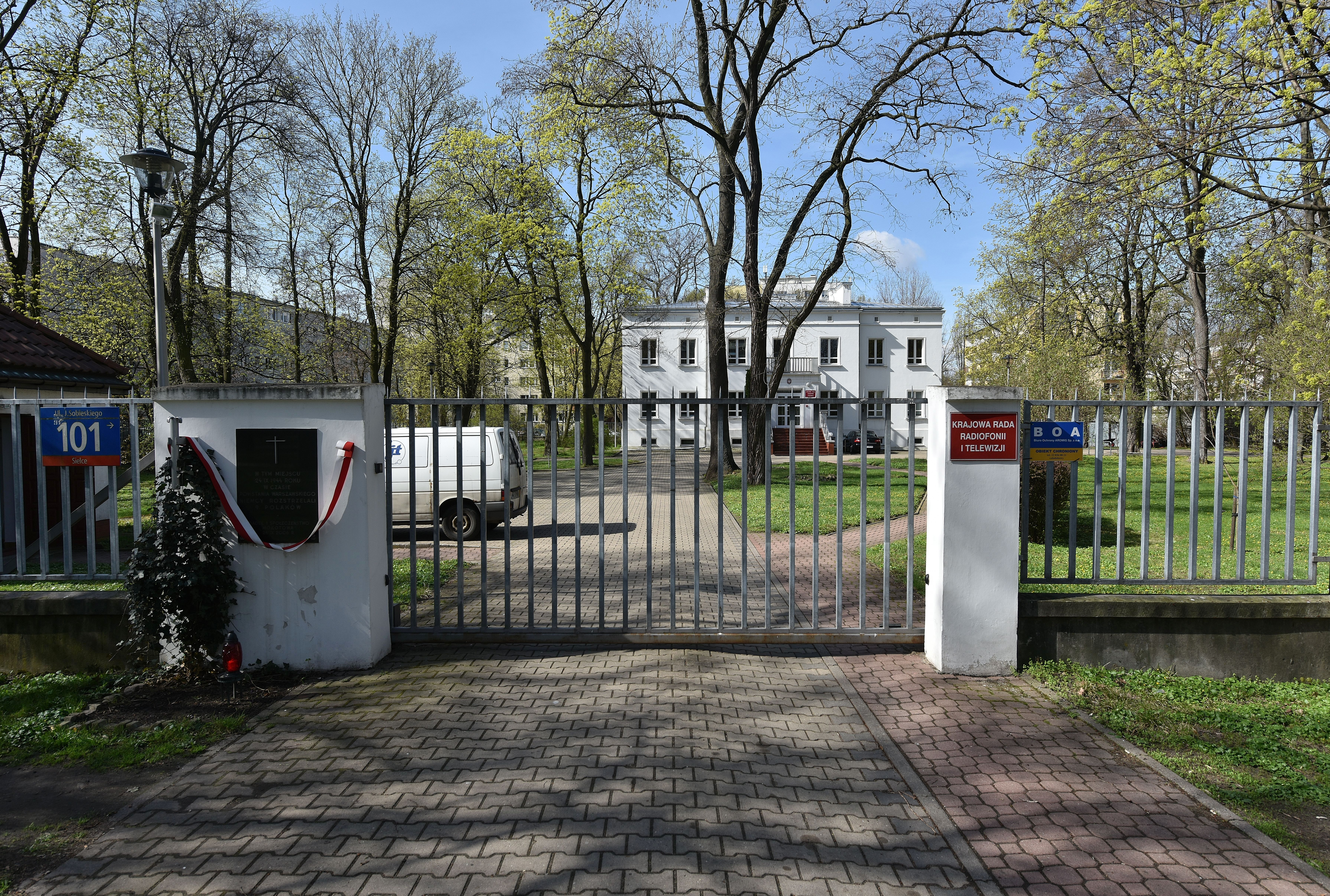 Biura Krajowej Rady Radiofonii i Telewizji przy ul. Sobieskiego 101 w Warszawie